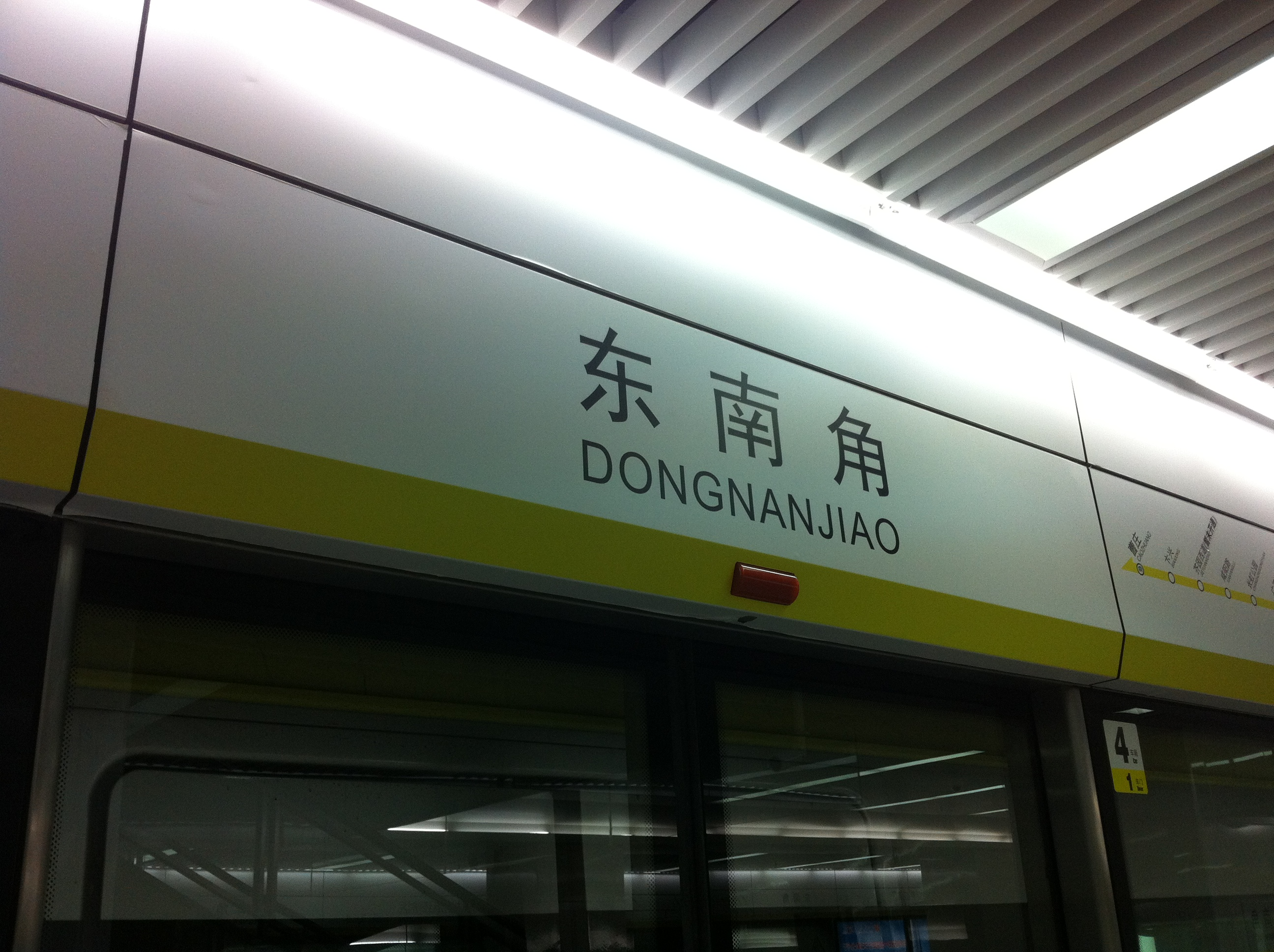 天津地铁二号线东南角站